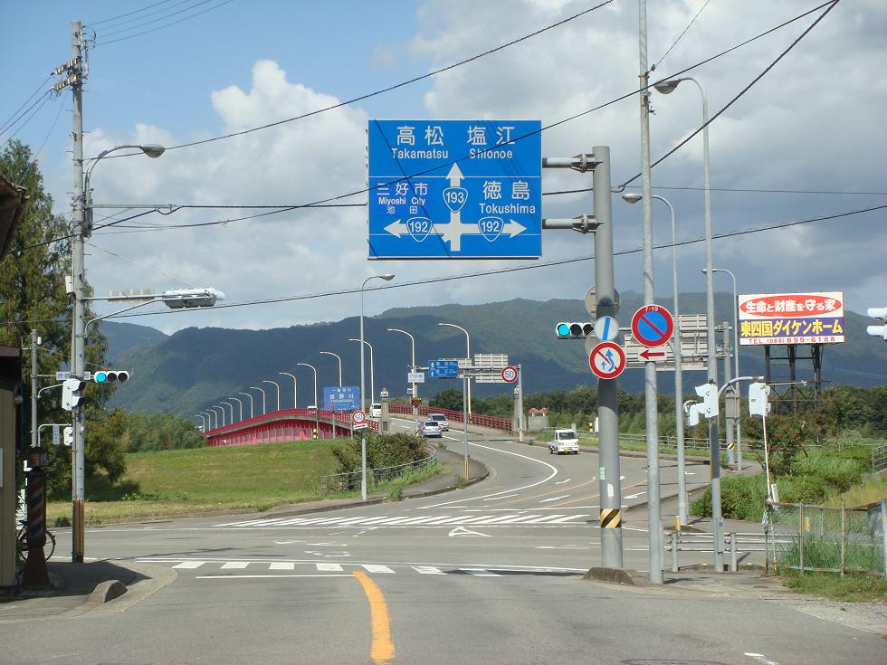 国道１９２号、１９３号、４９２号交差点（徳島県美馬市穴吹町）